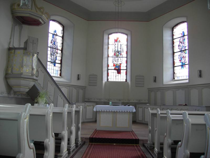 Innenansicht der Kirche von Womrath; Paul Schneider war hier 1934-1939 Pfarrer